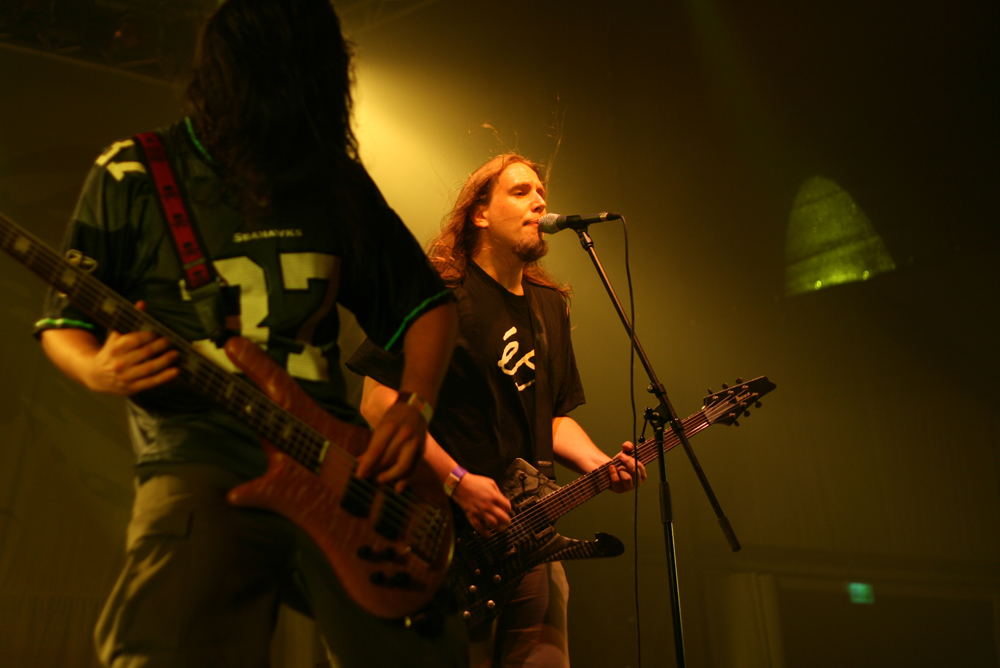 Depresszió live at a cocert.